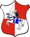 Herb wsi Dział, gmina Czarny Dunajec.